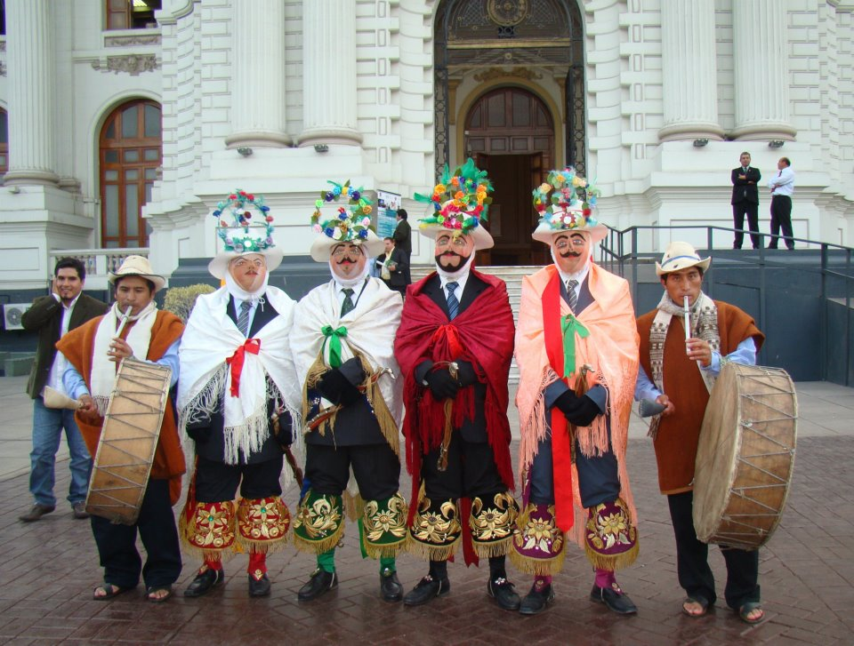 Danza ritual de la ciudad de Huari en Áncash.